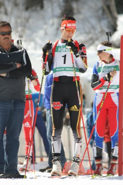 See Title